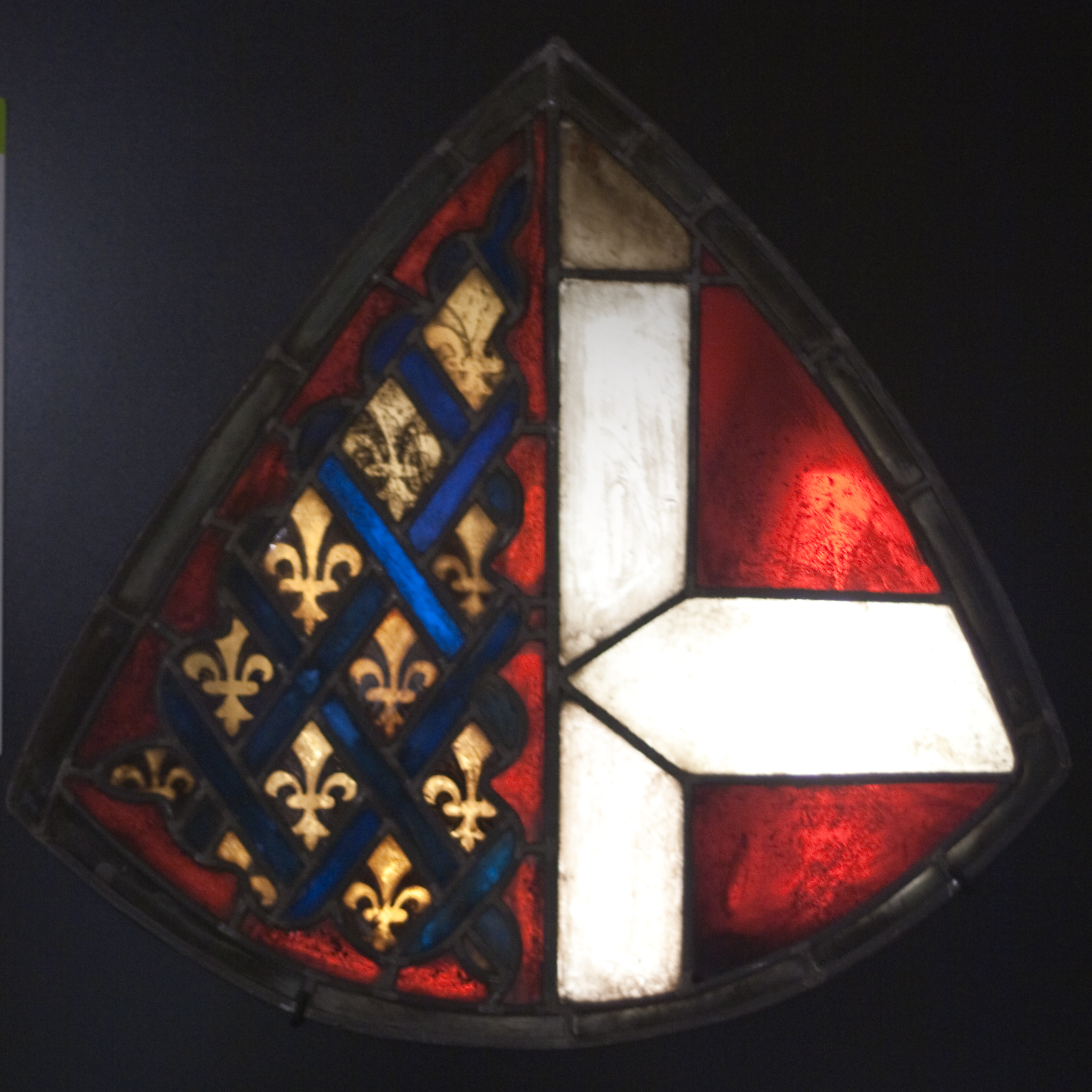 Copie d'un vitrail aux armes d'Amédée VII de Savoie et de Bonne de Berry, son épouse. L'original se trouve au Musée historique de Lausanne, cette copie fait partie de la collection du Château de Chillon. Arms reversed.